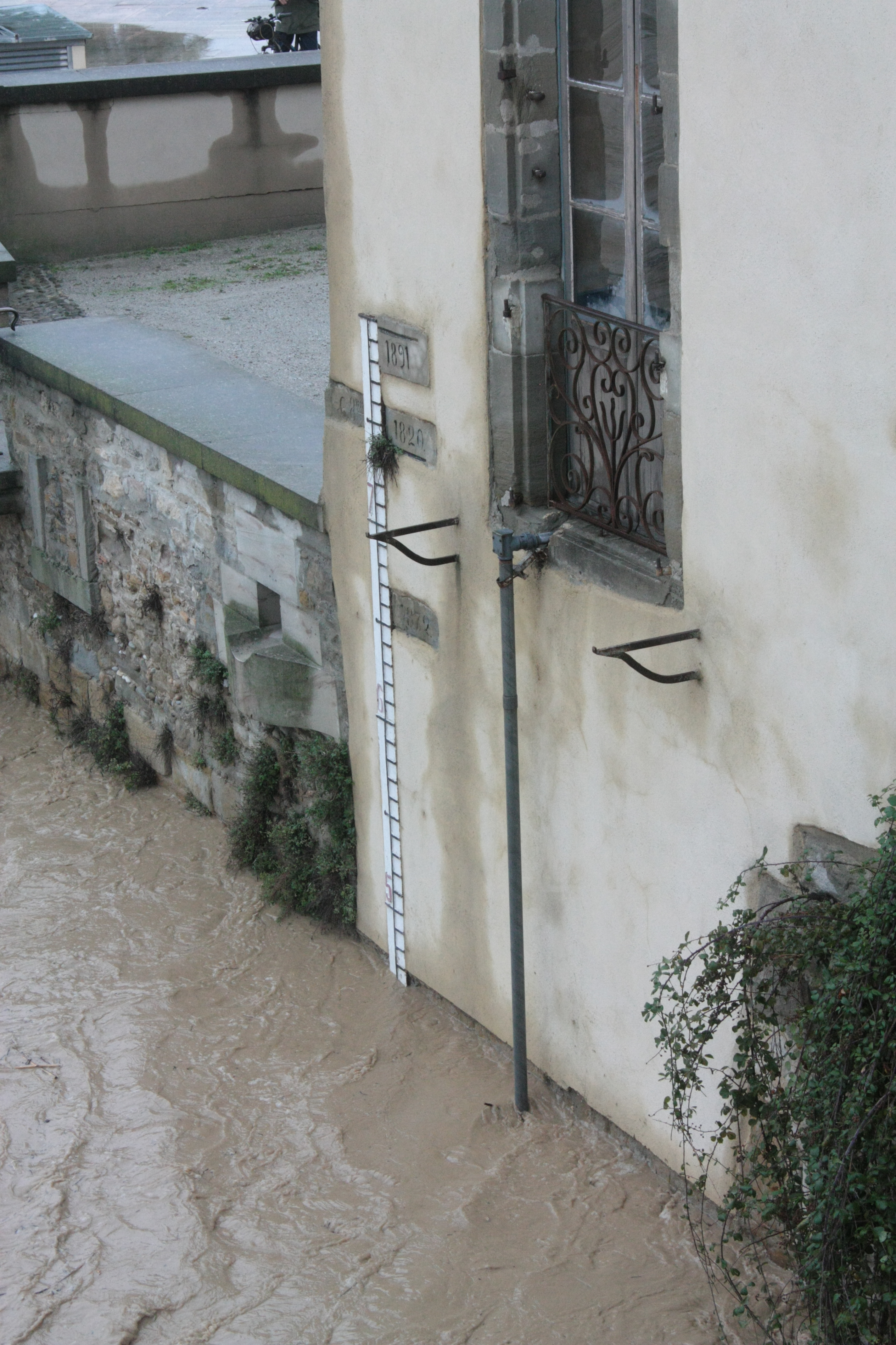 Lundi 15 octobre 2018, au matin : après d'importantes pluies durant la nuit, l'Aude sort de son lit. Niveau actuel : entre 4,6 et 4,7 m